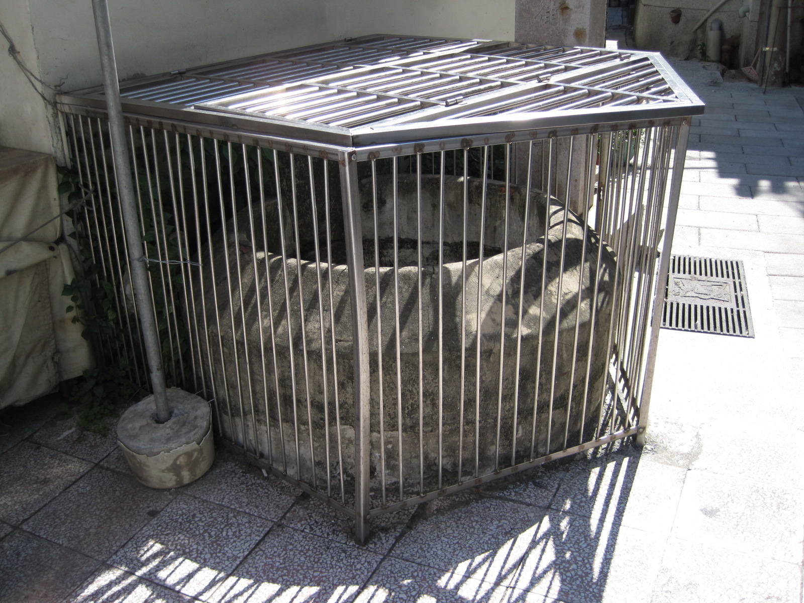 中文（台灣）: 臺南市延平街古井。